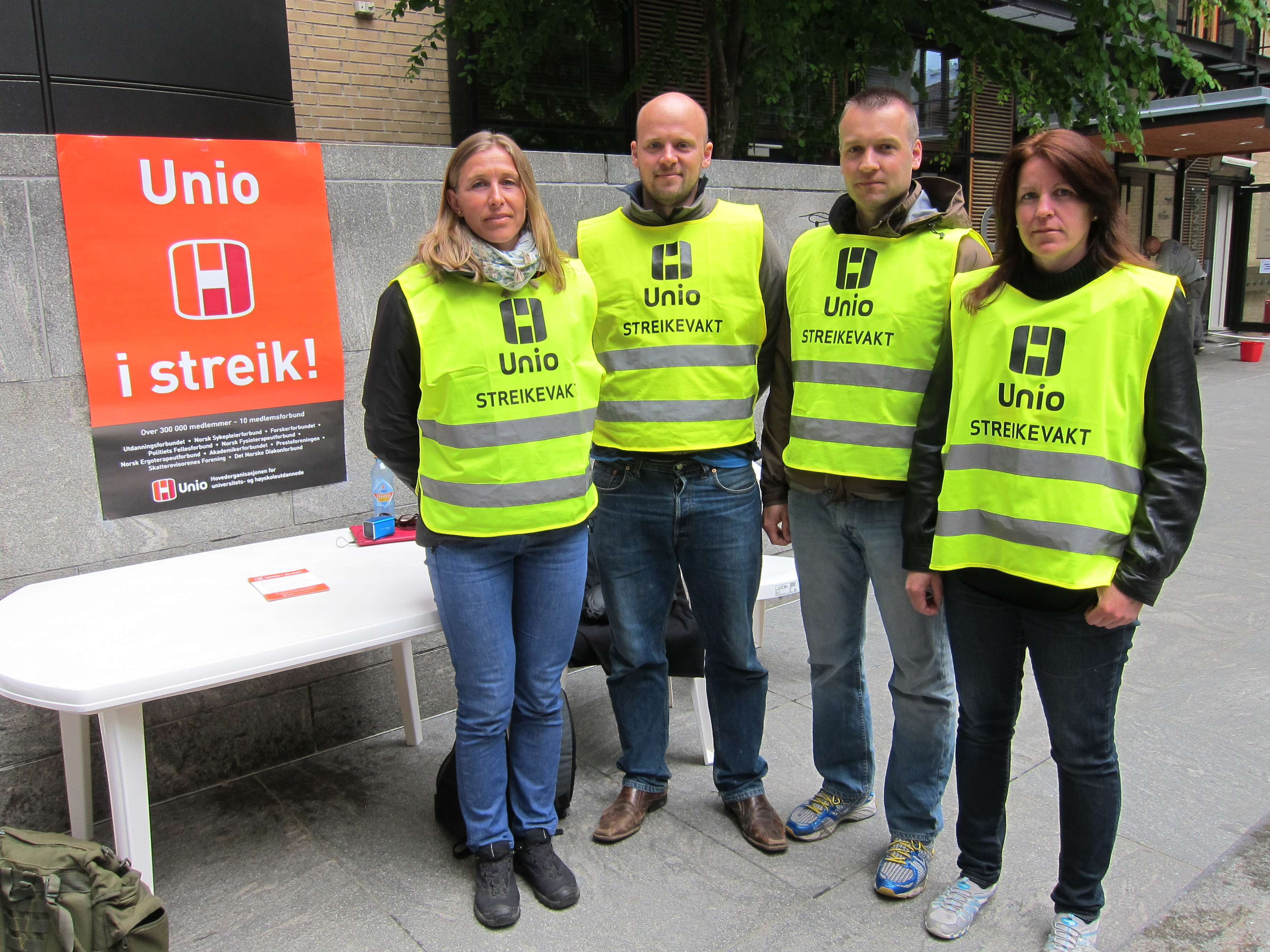 Workers on strike in Oslo, Norway, 2012